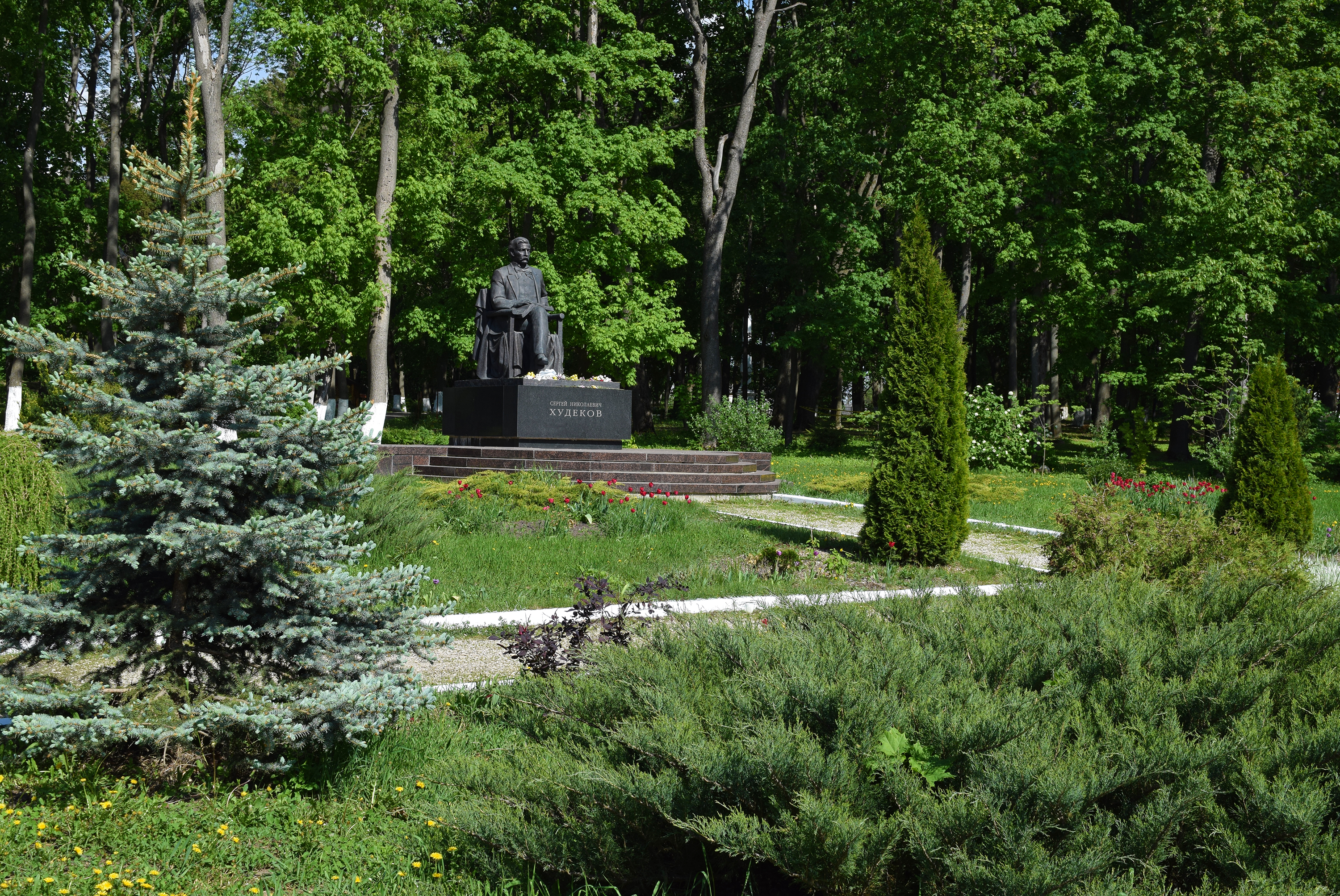 Село Ерлино, музей-заповедник "Ерлинский дендрарий" (усадьба С.Н.Худекова)